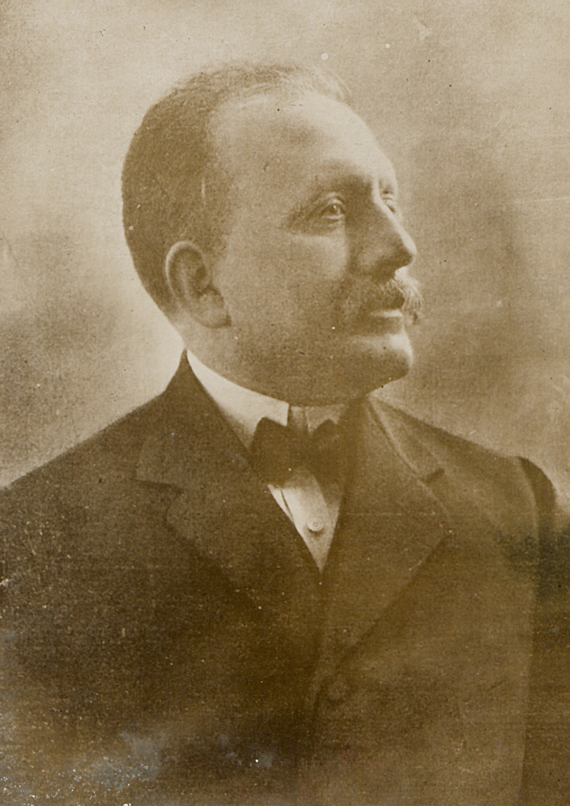 Salvatore Barzilai: italienischer Minister